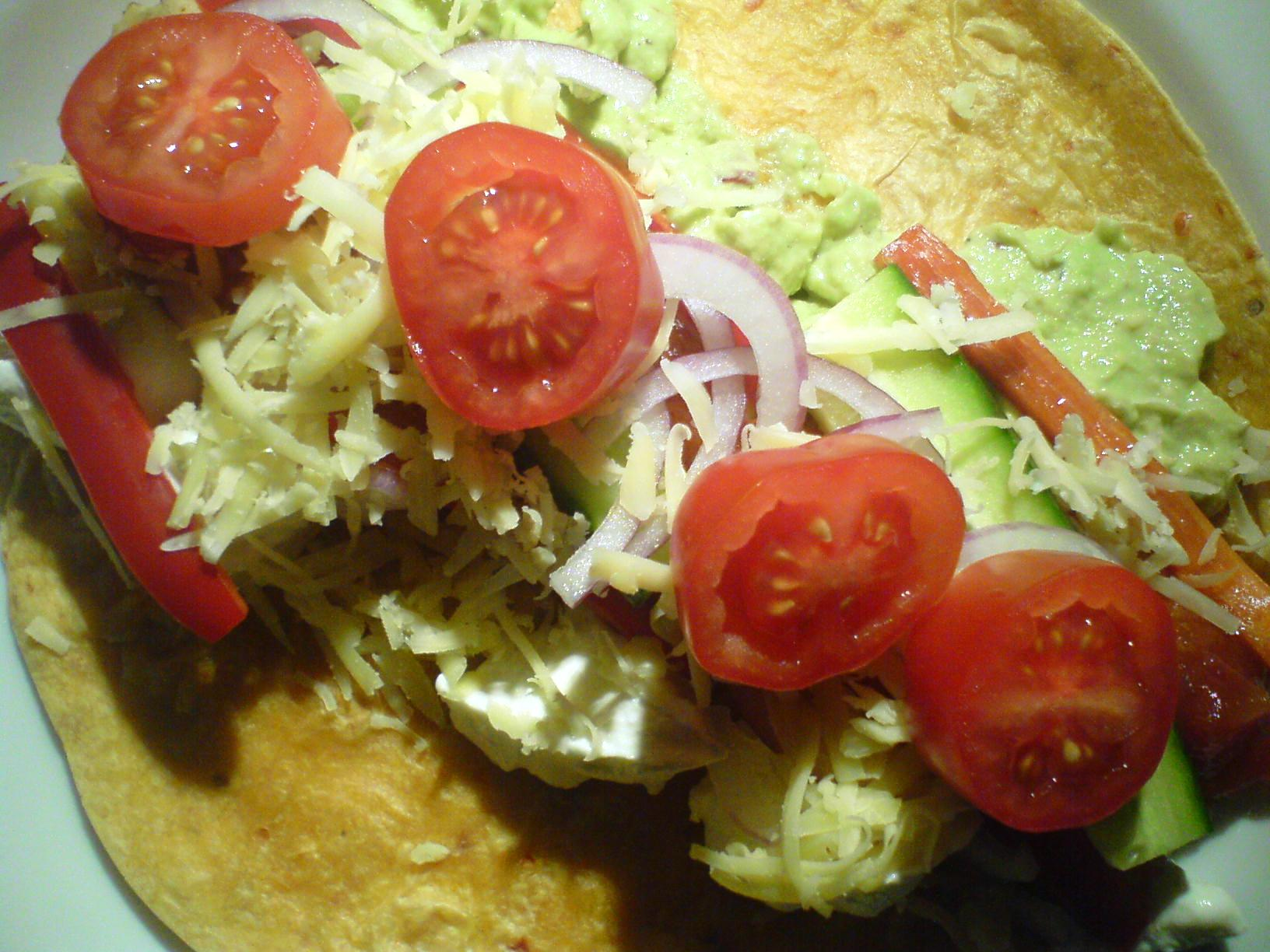 Tortilla med kylling, guacamole, peberfrugt, agurk, rødløg, tomat, ost og salsa